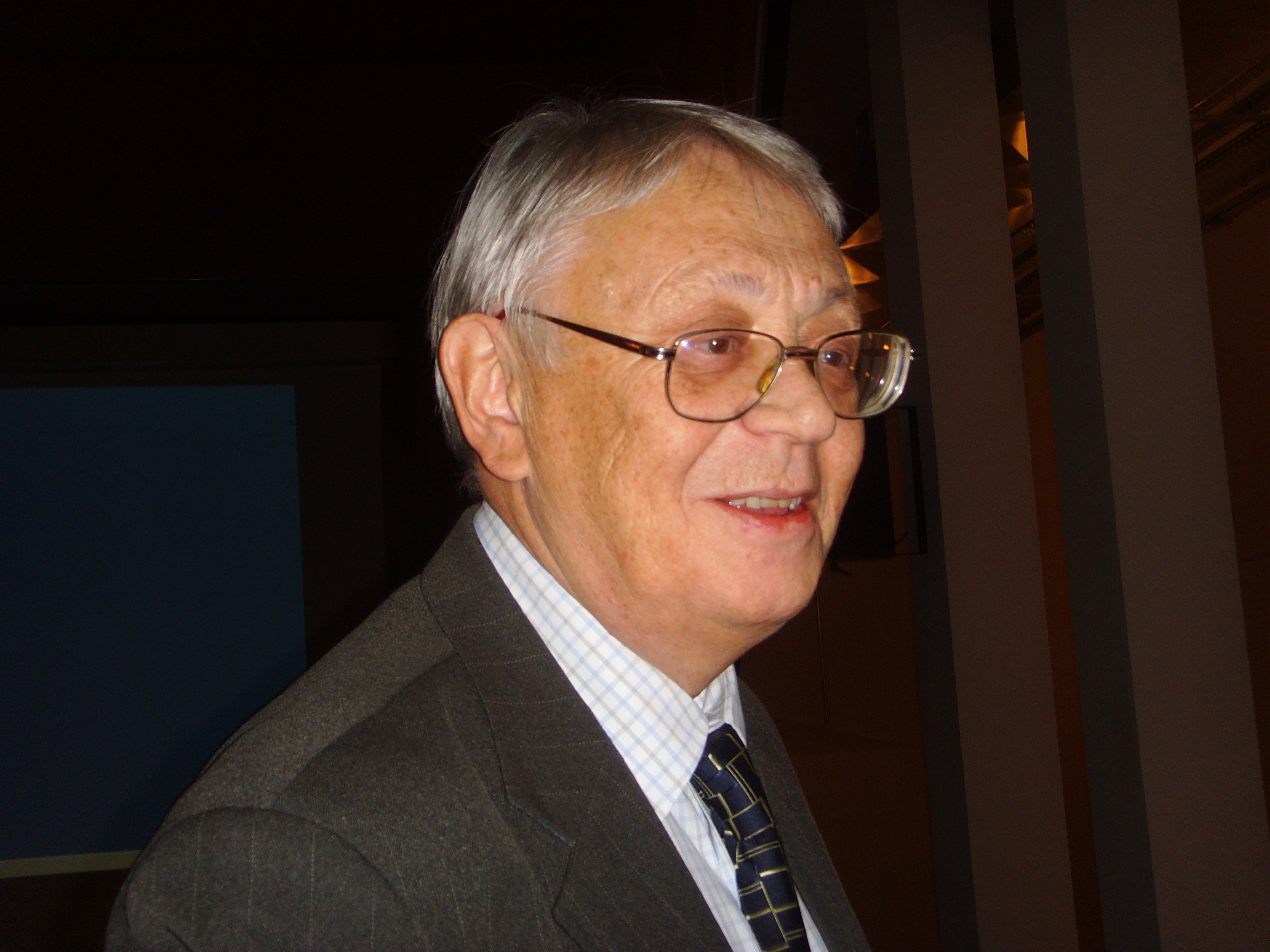 Мнухин, Лев Абрамович